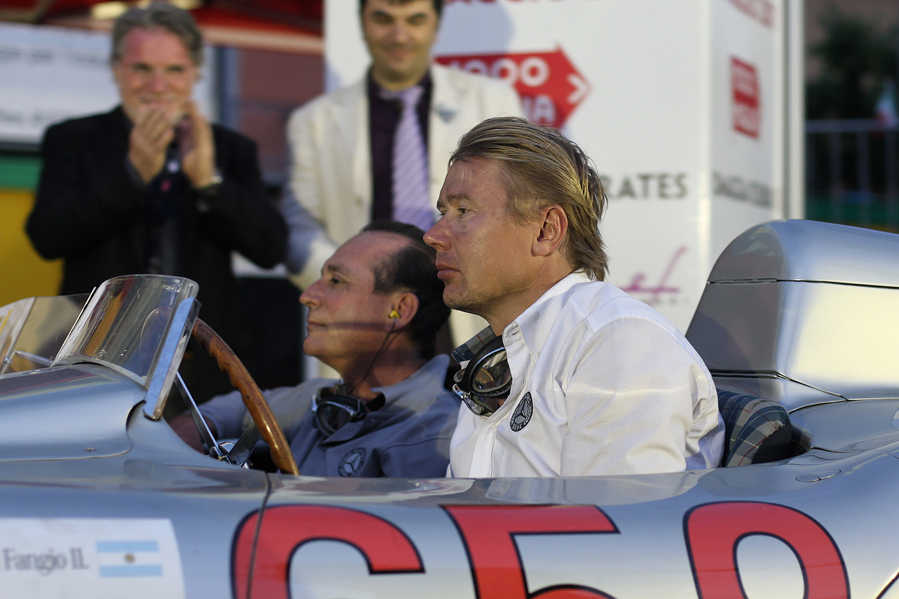 Mille Miglia 2011